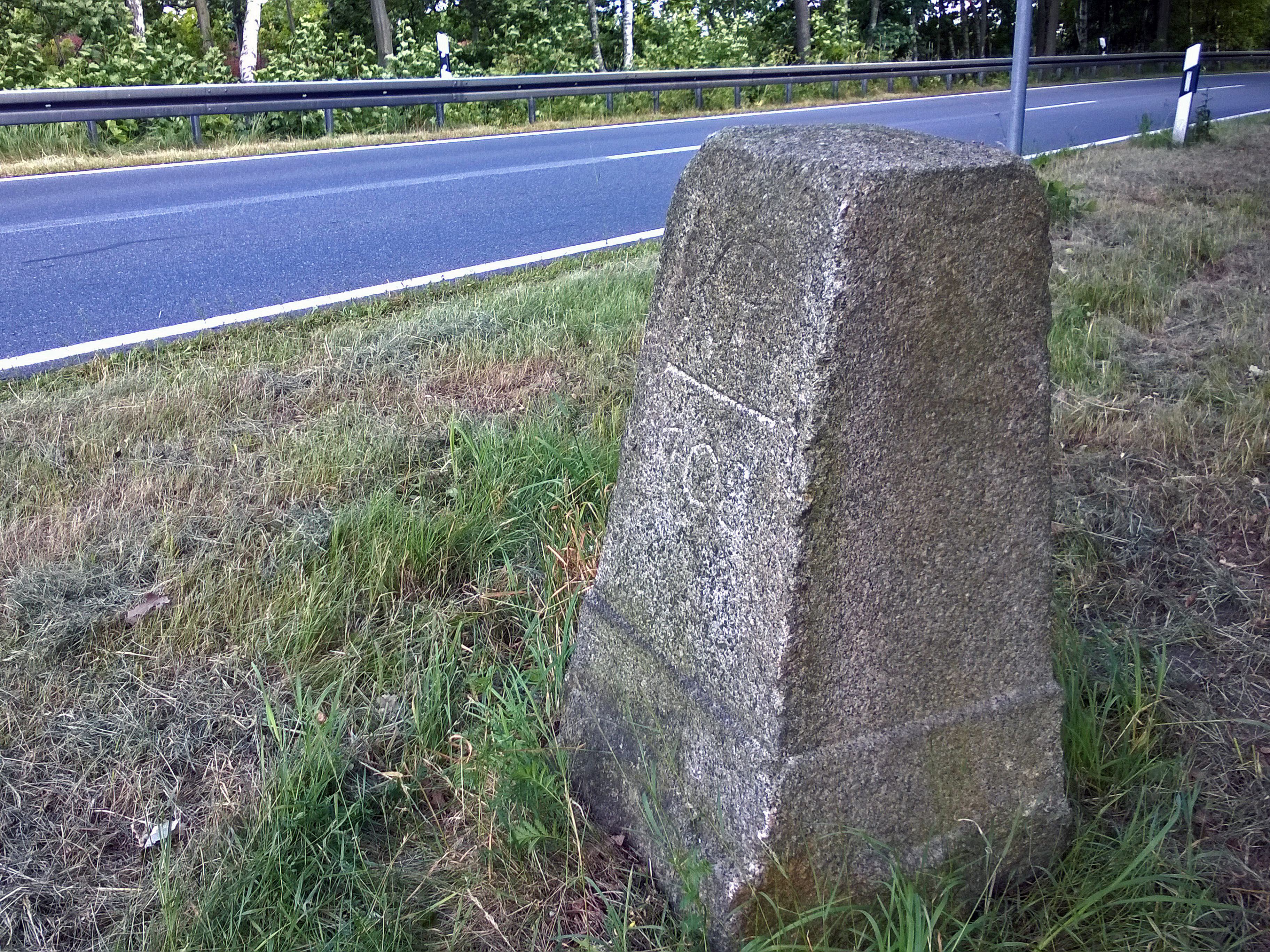 Grenzstein Nr. 108 Historische Landesgrenze Königreich Sachsen Königreich Preußen 1815 (Wiener Kongress) Hornjoserbsce: Historiski saksko-pruski měznik čo. 108 při zwjazkowej dróze 96 mjez Kamjeneju a Stróži